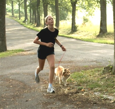 Geländelauf beim Turnierhundsport